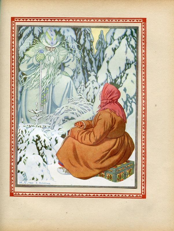 Русские народные сказки